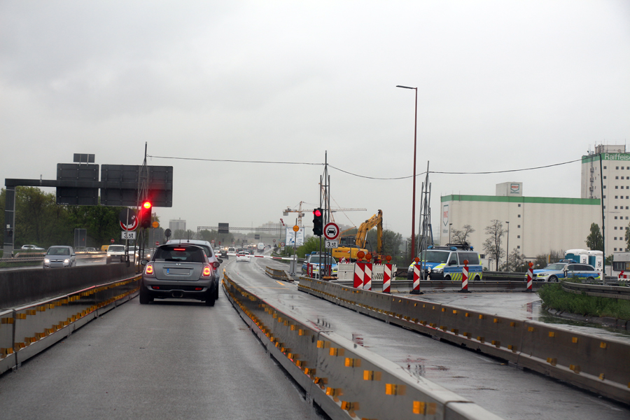 Gewichtskontrolle an der Anschlussstelle Äppelallee an der Bundesautobahn 643. Die Ampel ist auf rot, die Schranken geschlossen, da auf der mittleren Spur ein LKW (nicht im Bild, Fahrzeug befindet sich rechts nebem dem Fotografen) versuchte, über die Schiersteiner Brücke zu fahren.